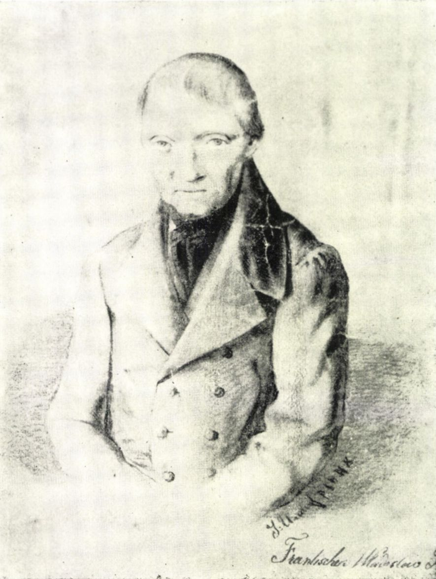 František Vladislav Hek (1769 - 1847), Český vlastenec, národní buditel a spisovatel.